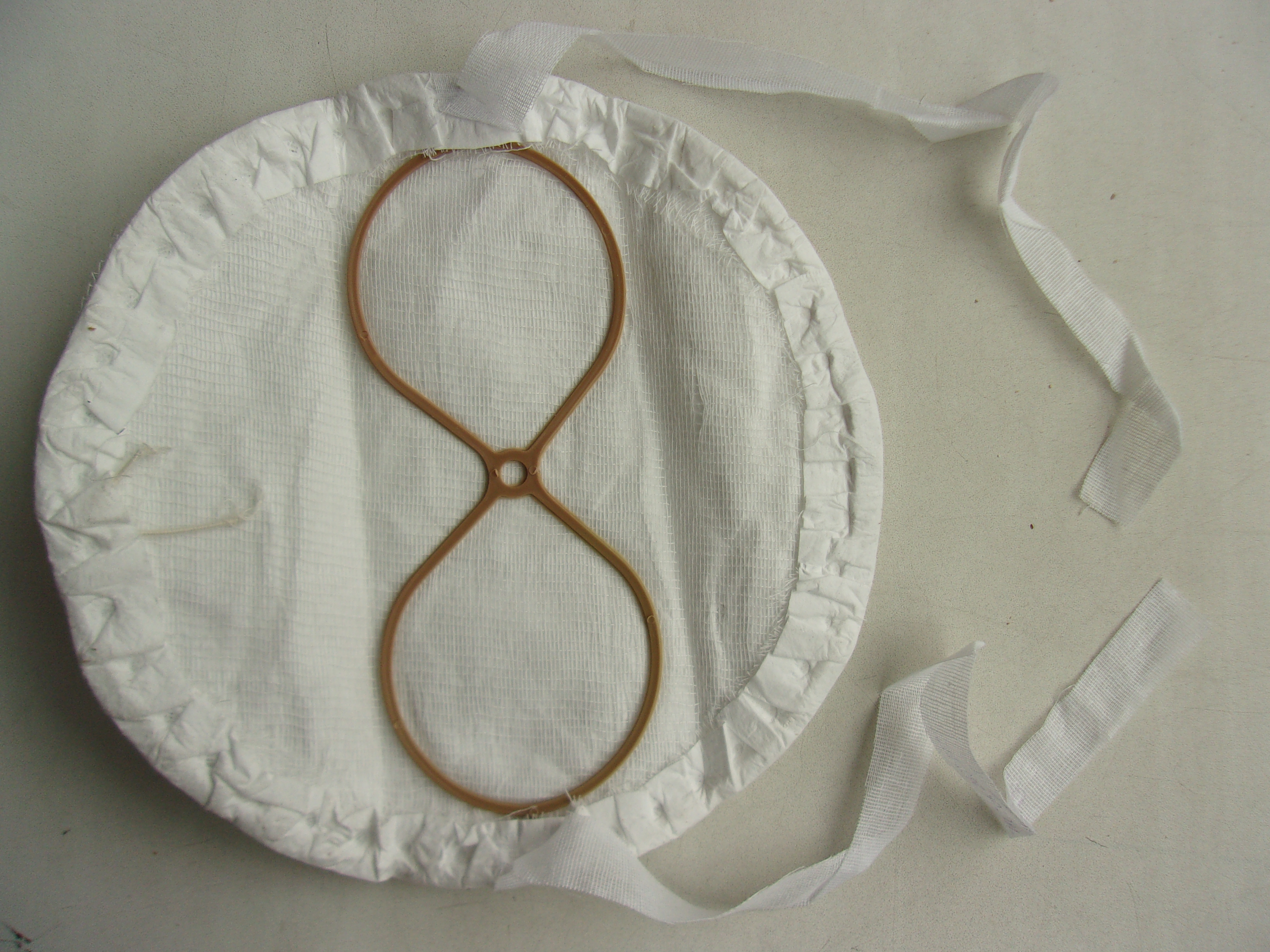 Фильтрующая полумаска Лепесток-200, предназначена для защиты от пыли аэрозолей, производится с небольшими модификациями с 1957г, выпущено более 6 млрд шт. Число 200 в названии означает декларируемую эффективность - изделие якобы снижает концентрацию мелкодисперсной пыли (наиболее плохоулавливаемой) минимум в 200 раз. Это не подтверждается результатами независимых испытаний как в лабораторных, так и в производственных условиях; а применение подобных СИЗОД ограничено научно-обоснованным национальным законодательством в США - не более 10 ПДКрз. См. Респираторы ШБ Лепесток. Хотя изделие сертифицировано после принятия ГОСТ 12.4.191, на нём отсутствует маркировка (название модели, класс защиты, изготовитель).